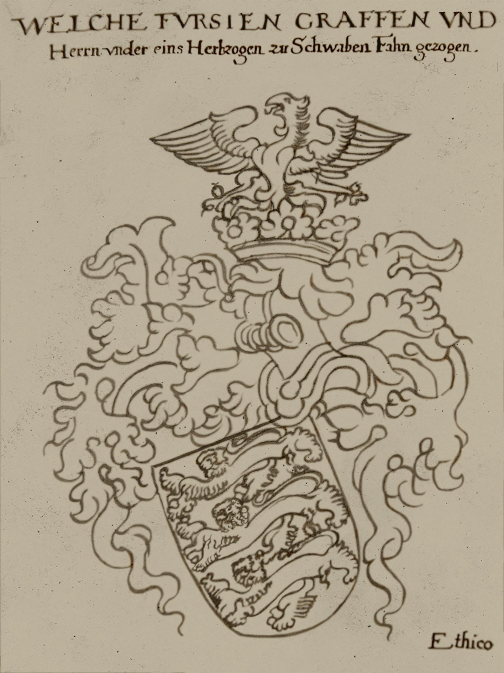 Um Zusätze vermehrte Abschrift von Sigmund Feyerabends Frankfurter Ausgabe (1578/1579) des Turnierbuchs von Georg Rüxner (Jörg Rugen), Handschrift auf Papier in zwei Bänden, 17. Jahrhundert. Detail (retuschiert)